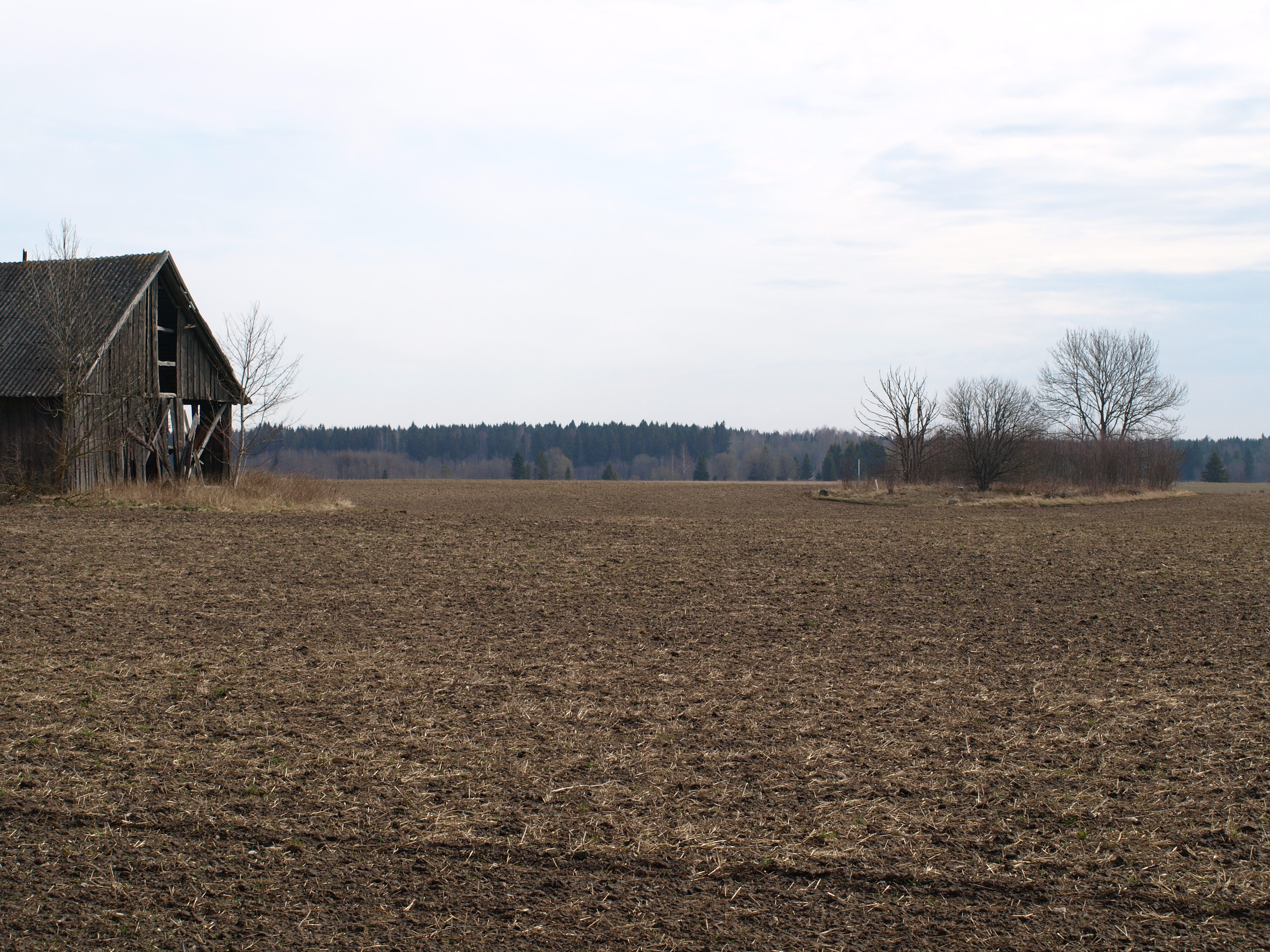 Kivikalme "Kirikumägi"